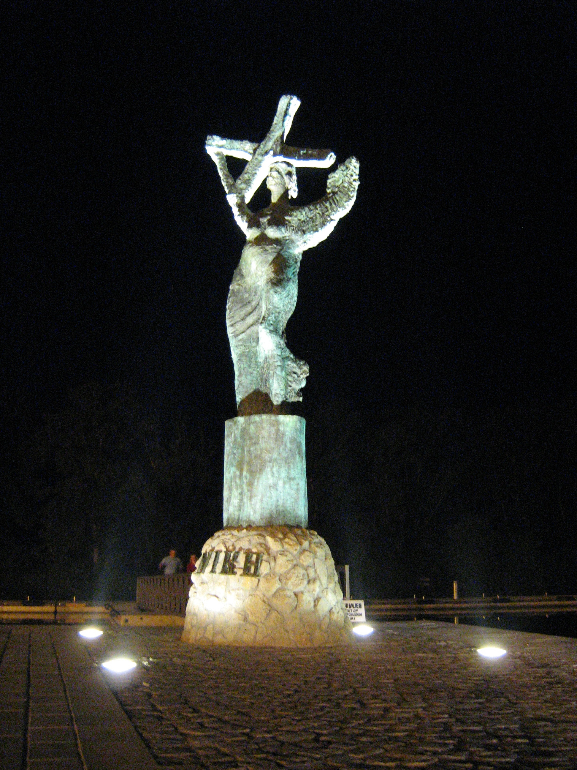 Аутор: Пајкмен